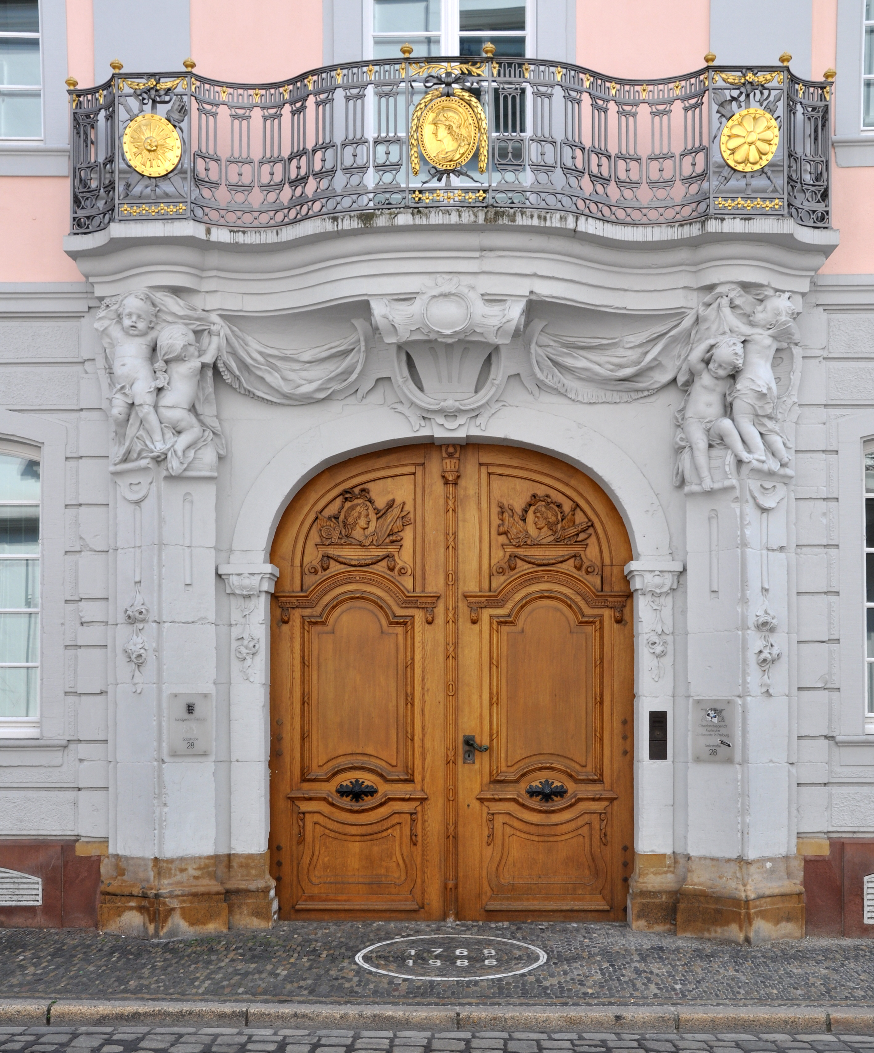 Freiburg im Breisgau, Salzstraße, Deutschordenskommende